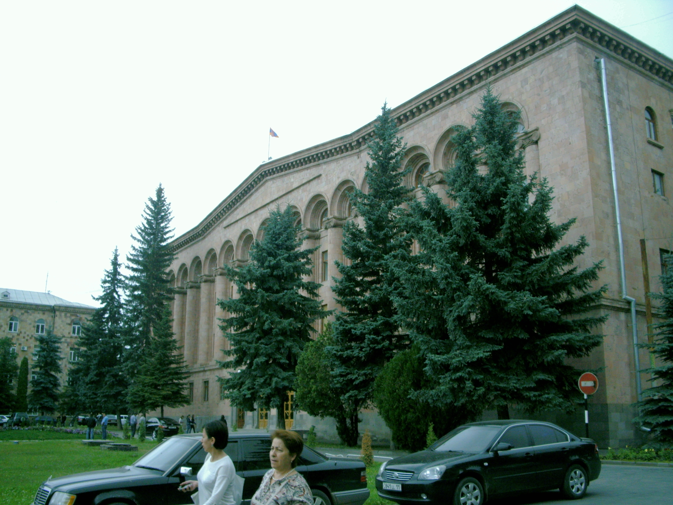 Լոռու մարզկենտրոնի շենքը, Վանաձոր, 1953 թ., ճարտ. Զ. Բախշինյան 1/36.1